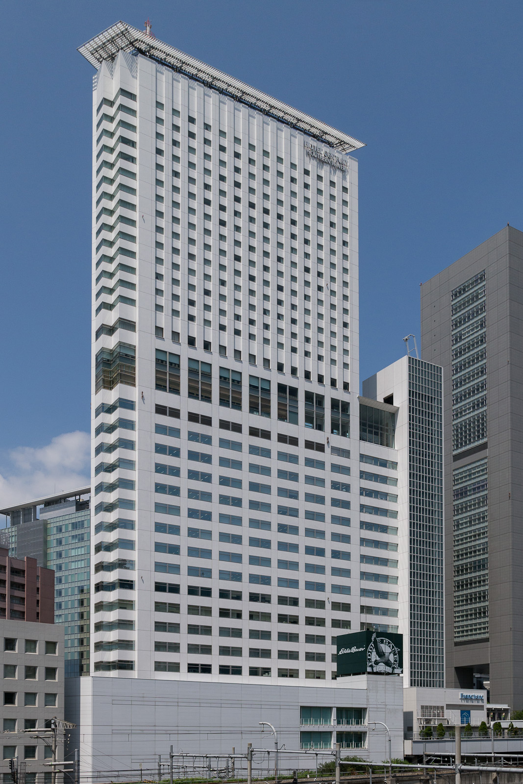 小田急サザンタワー、東京都渋谷区代々木。